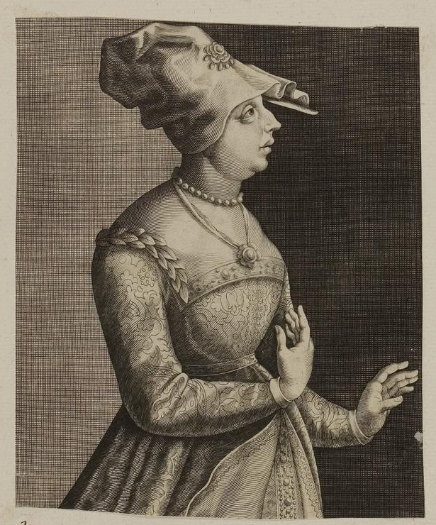 Grafik aus dem Klebeband Nr. 1 der Fürstlich Waldeckschen Hofbibliothek Arolsen Motiv: Johanna II., Königin von Neapel (1373-1435)